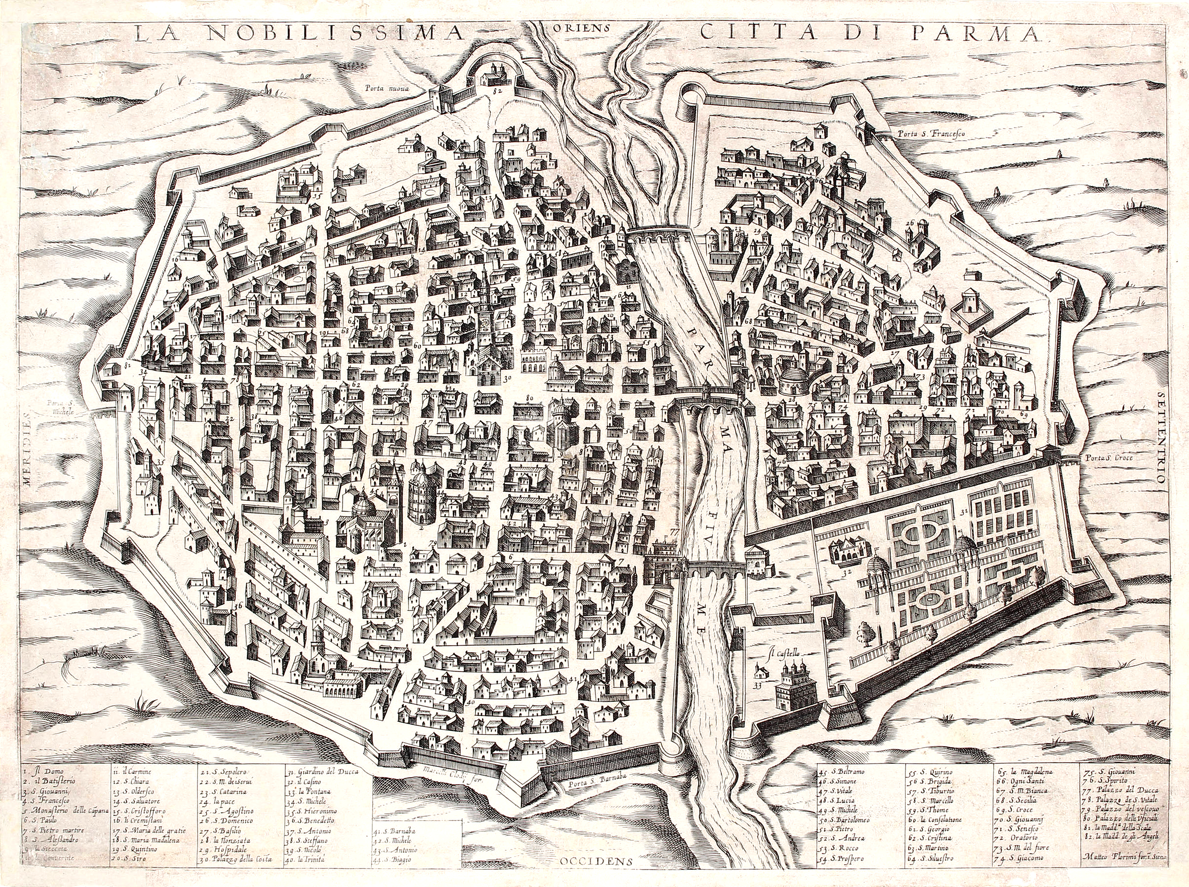 Mappa della città di Parma, disegnata da Ambrogio Brambilla ed edita da Marcello Clodio dopo il 1567